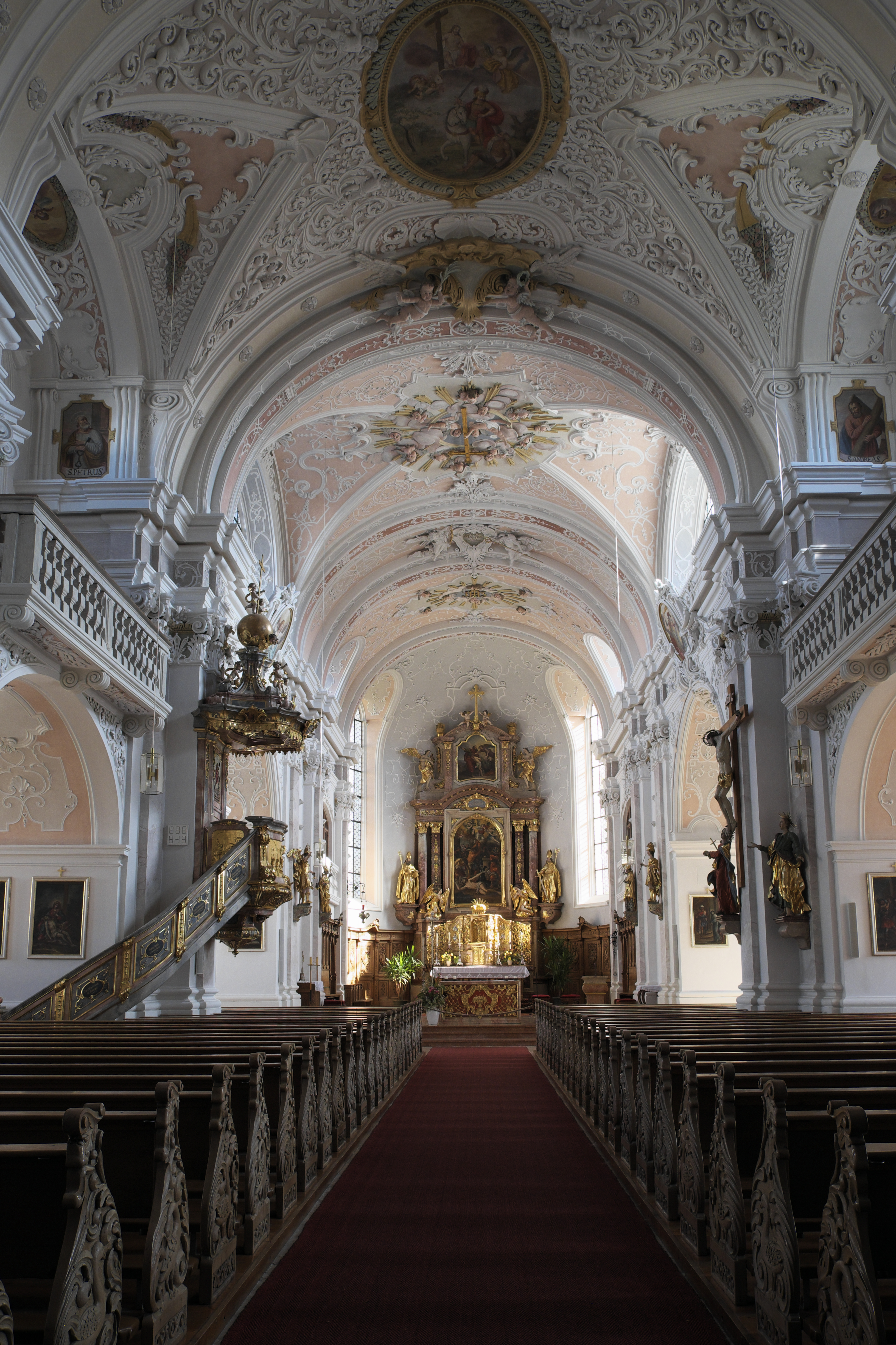 Katholische Pfarrkirche St. Martin in Waging am See im Landkreis Traunstein (Bayern/Deutschland), Innenraum